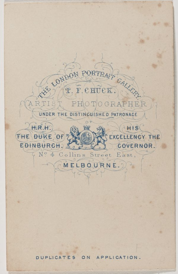 Verso de la carte de visite de Thomas Foster Chuck pour son studio de Royal Arcade à Melbourne.